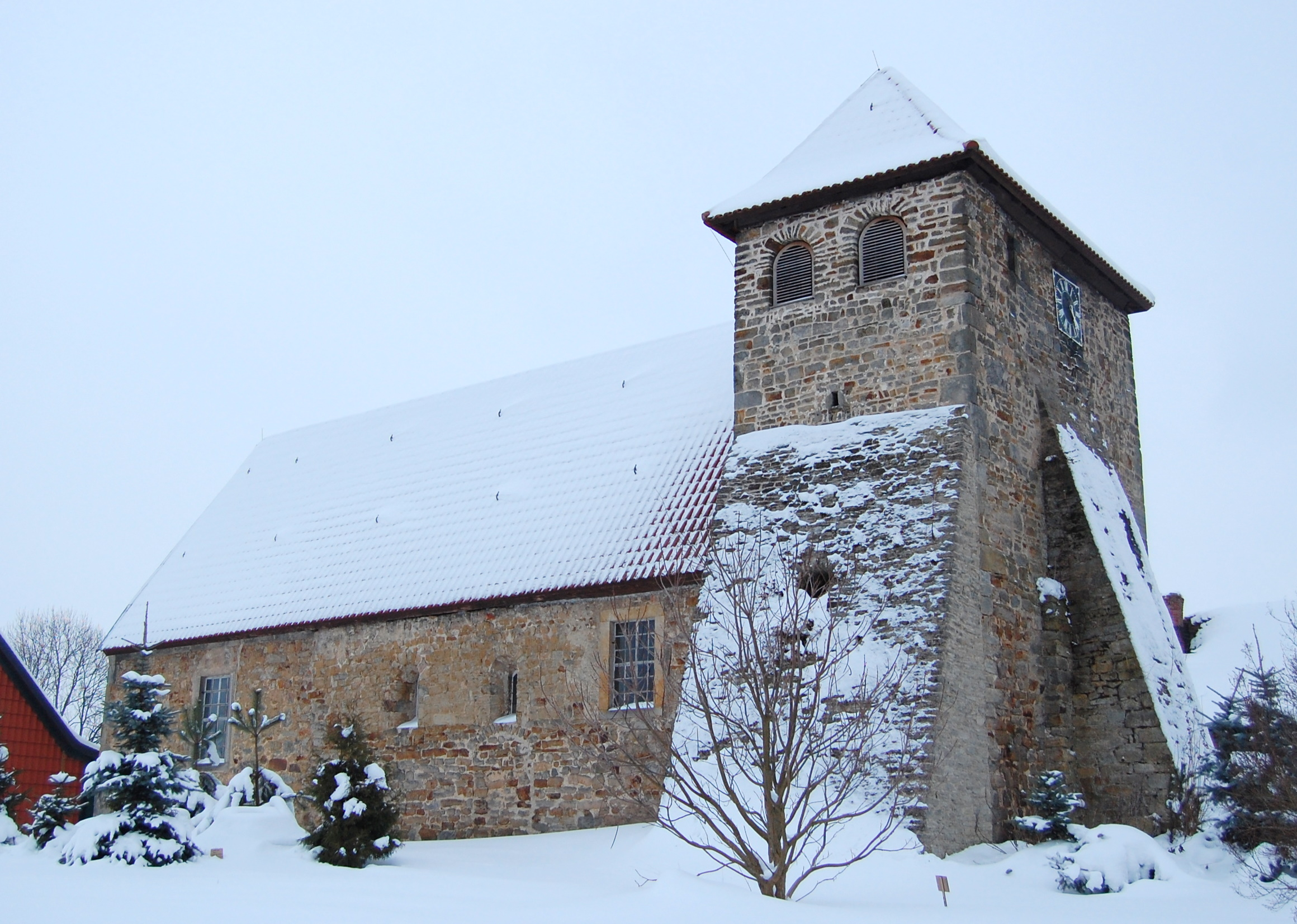 Sankt-Petrus-Kirche in Morsleben, Nordseite